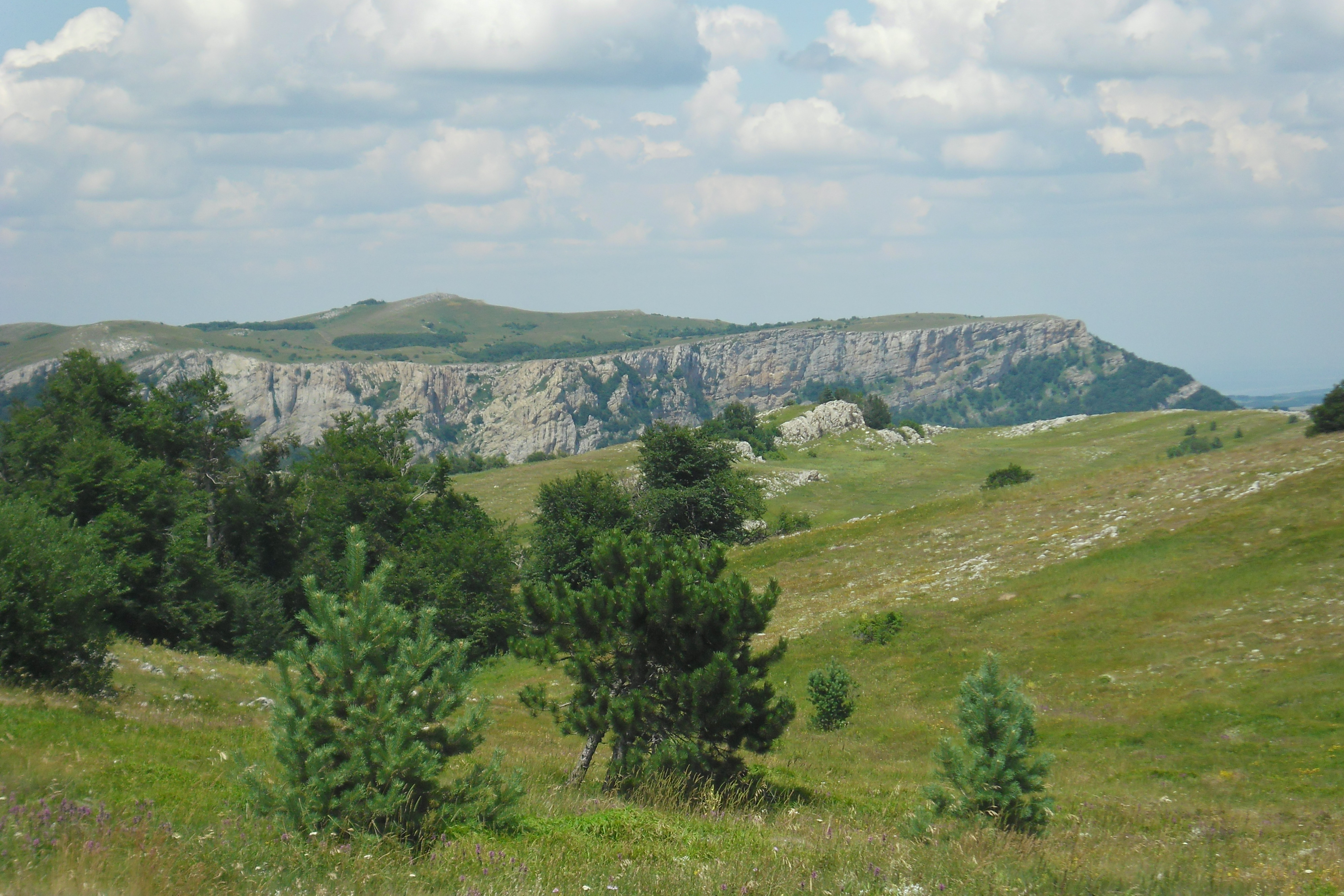 Фото